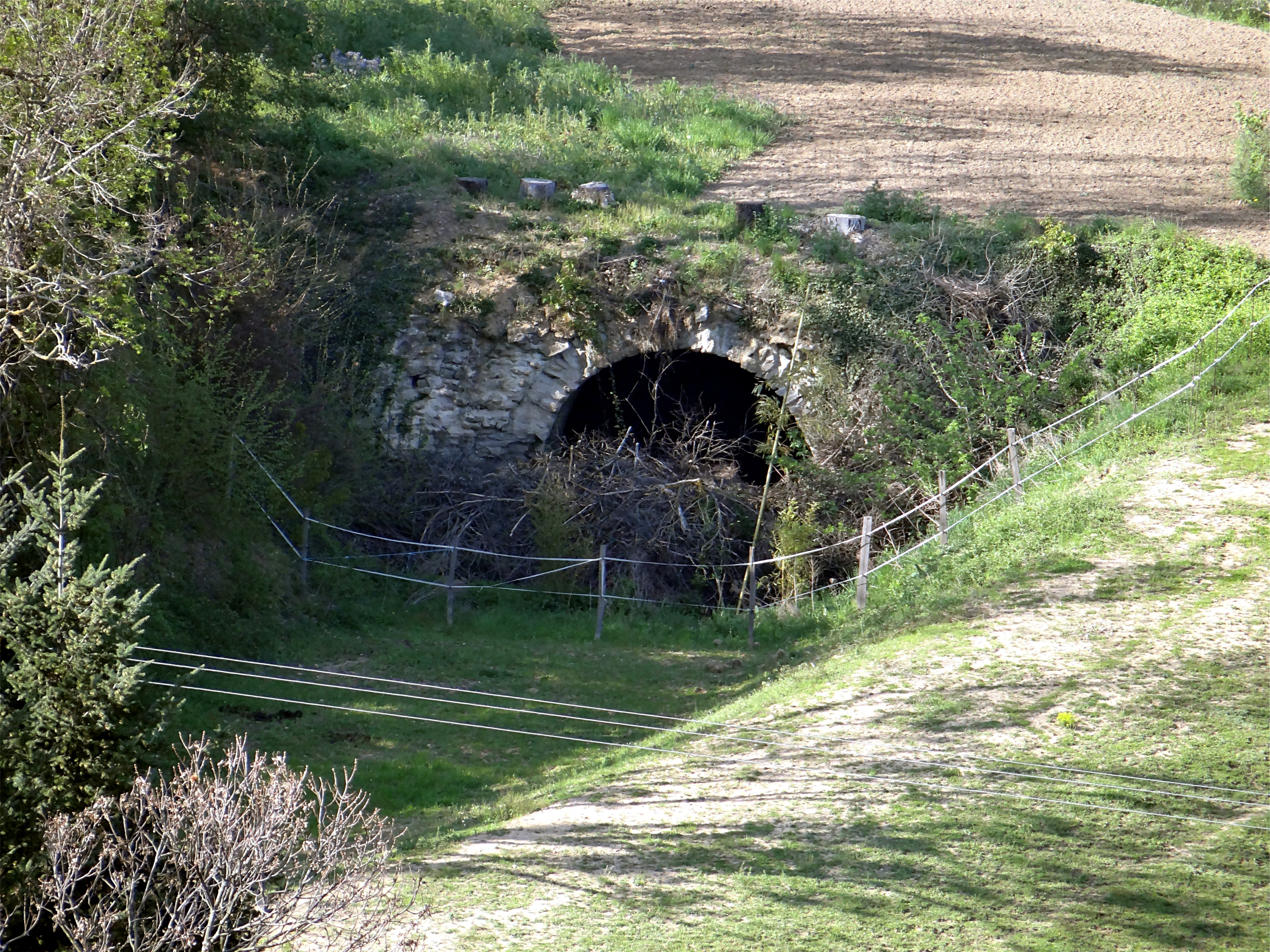 Tracé de l'ancienne ligne de chemin de fer Messimy - Saint-Symphorien-sur-Coise à Rontalon, Rhône, France. Entrée du tunnel au sud de "La Pierre à Chaux", vue du chemin des Grandes Bruyères.